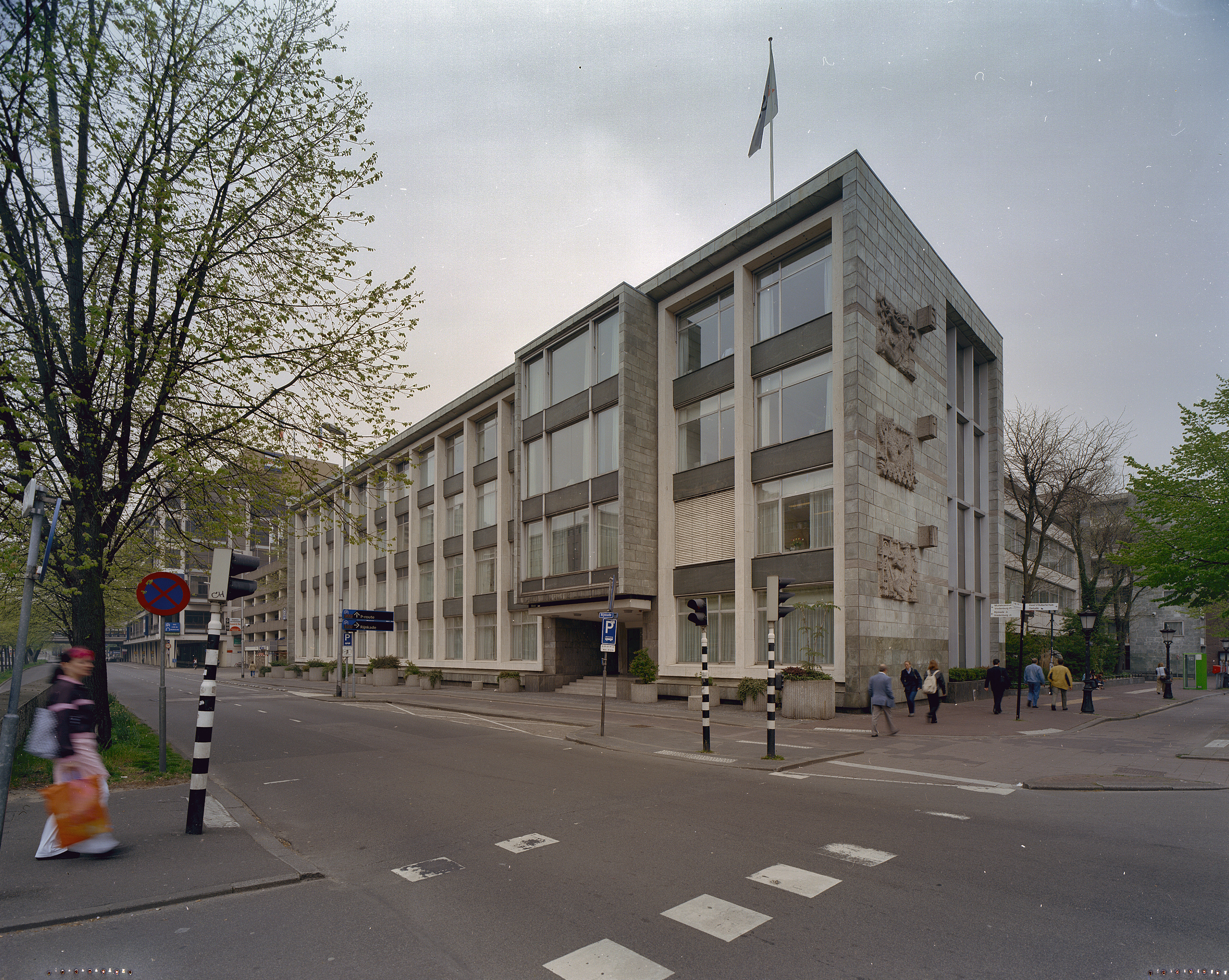 Shv-Kantoor: Overzicht voorgevel en gedeelte rechter zijgevel (opmerking: Gefotografeerd voor Toonbeelden van de Wederopbouw) Its number in the list of 89 proposed monuments is: 2013-31 For more information see Dutch Wikipedia: Beschermingsprogramma Wederopbouw 1959-1965